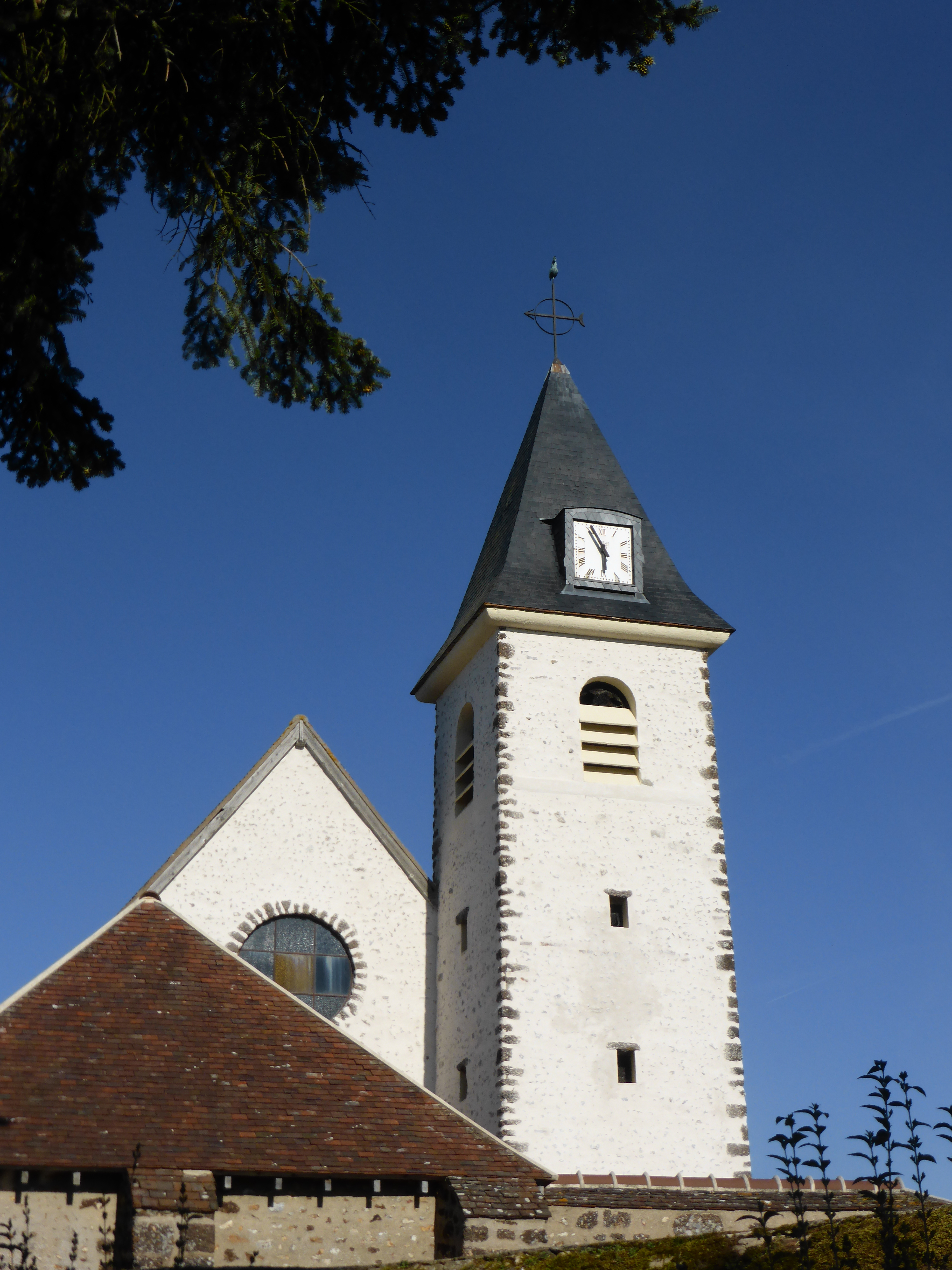 Église de Jaudrais, en Eure-et-Loir.